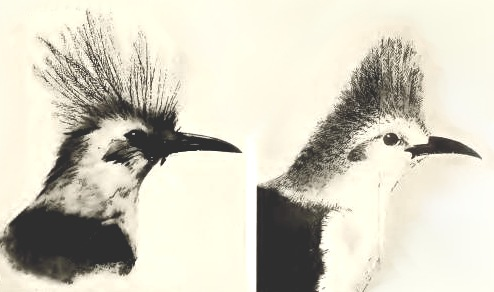 Specimens from the natural history museums of Caen and Paris, published in Un Oiseau éteint de la Réunion, Fregilupus varius. Société linnéenne de Normandie. 4 Volume, 6 Series, 1913.